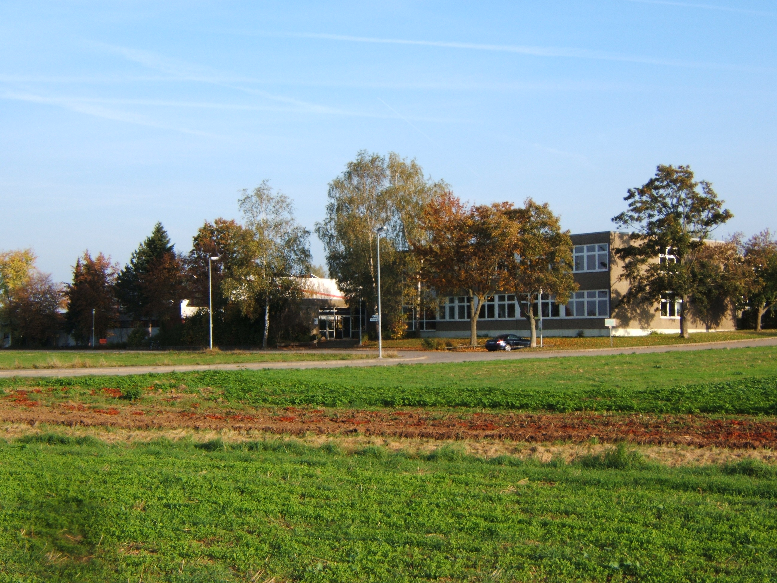 Schönbuchschule der Gemeinde Hildrizhausen